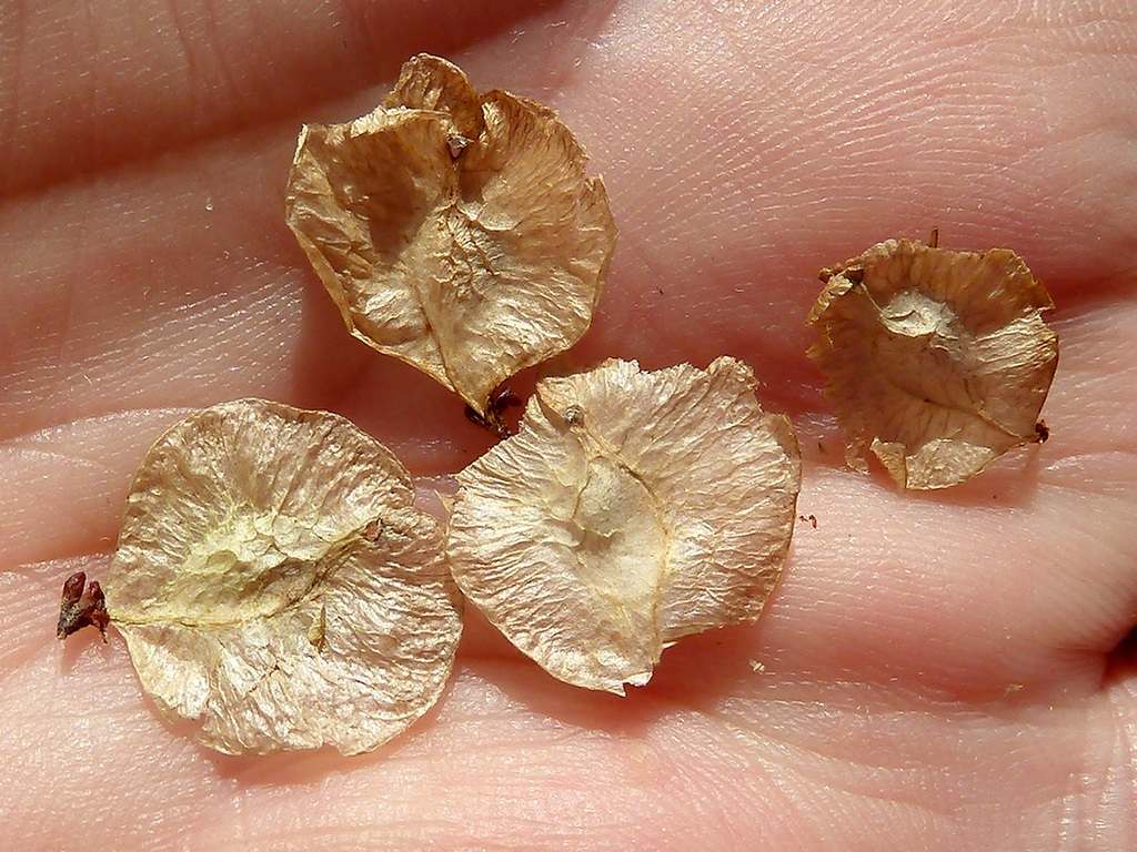 Ulmus pumila (Olmo de Siberia) - Frutos maduros sueltos - Cultivado/ornamental, Calle de Brescia, Madrid (España).